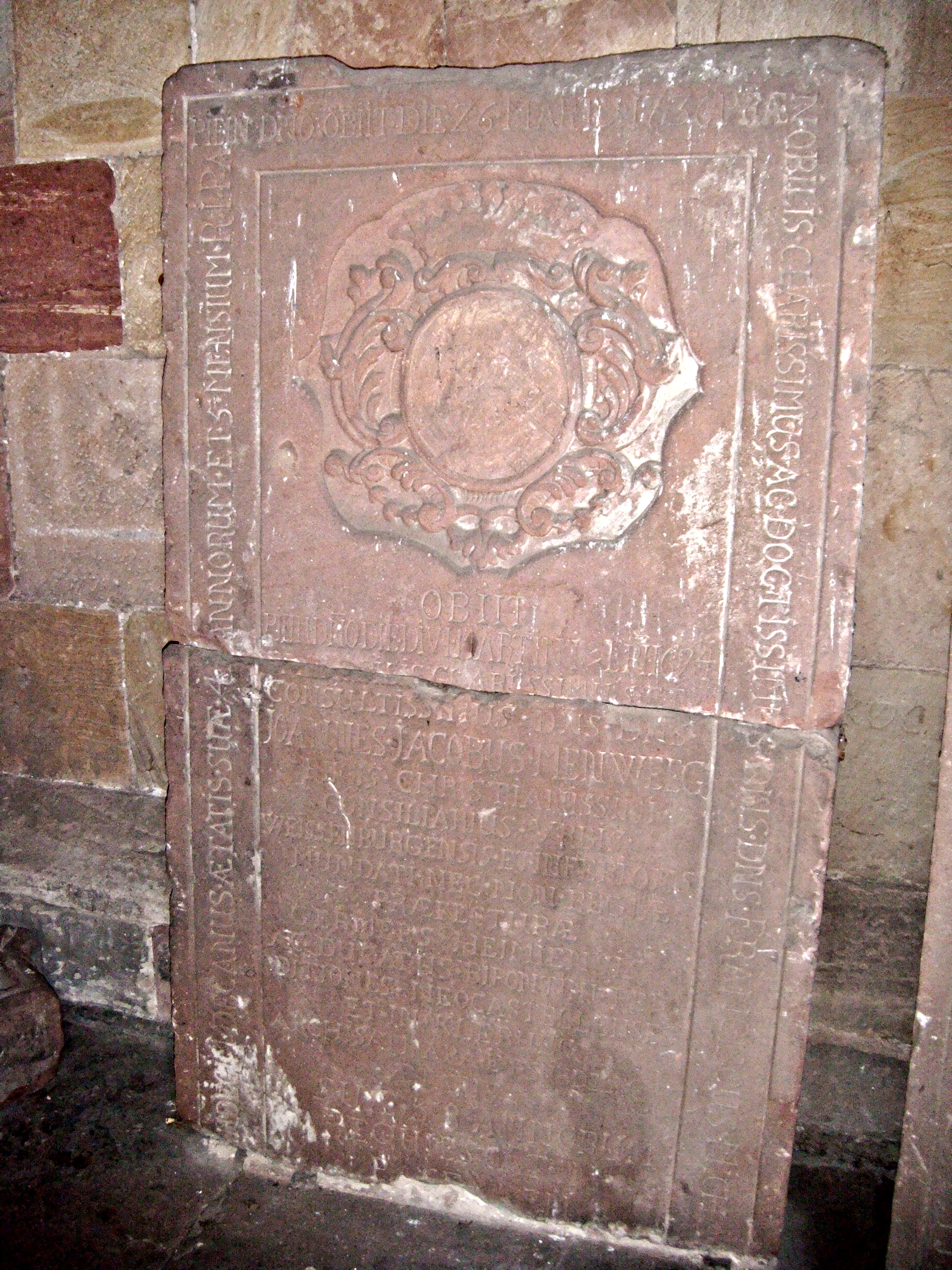 Grabplatte Johann Jakob Menweeg, (1636-1694), französischer Präfekt, in der Abteikirche Wissembourg